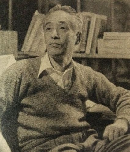 渡辺一夫